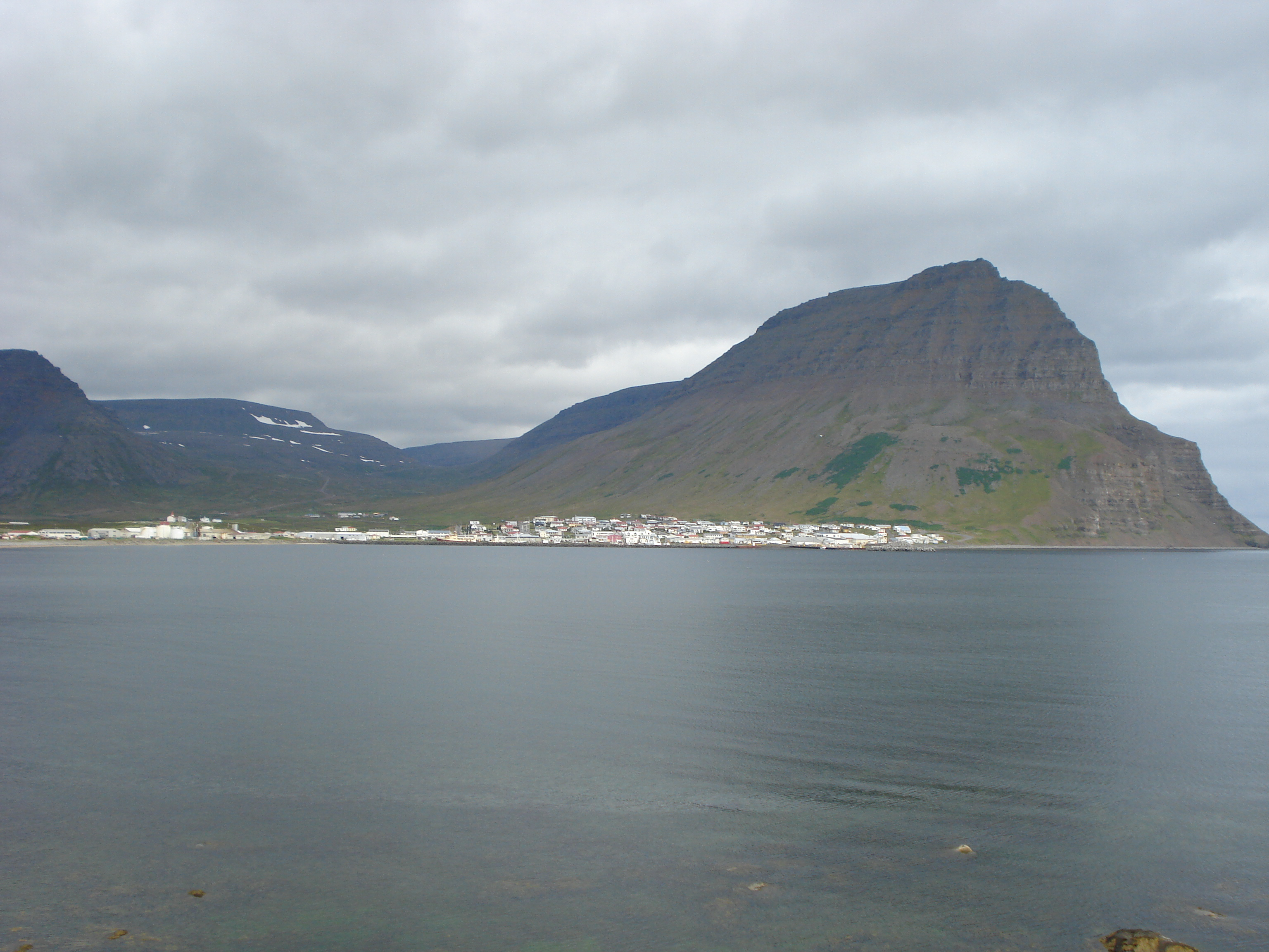 Bolungarvík, Iceland